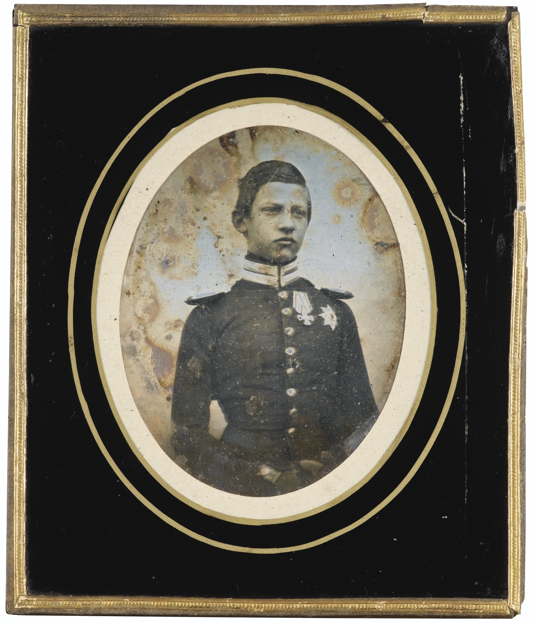 Frédéric Guillaume de Prusse (né en 1831 à Potsdam), vgl. Stahlstich Kronprinz Friedrich Wilhelm, nach Franz Krüger von A. Teichel, Druck v. J. Becker vormals Altmayer um 1845. FORMAT: Bildgröße mit der Schrift: ca. 149 x 98 mm in 8vo daguerréotype vers 1841